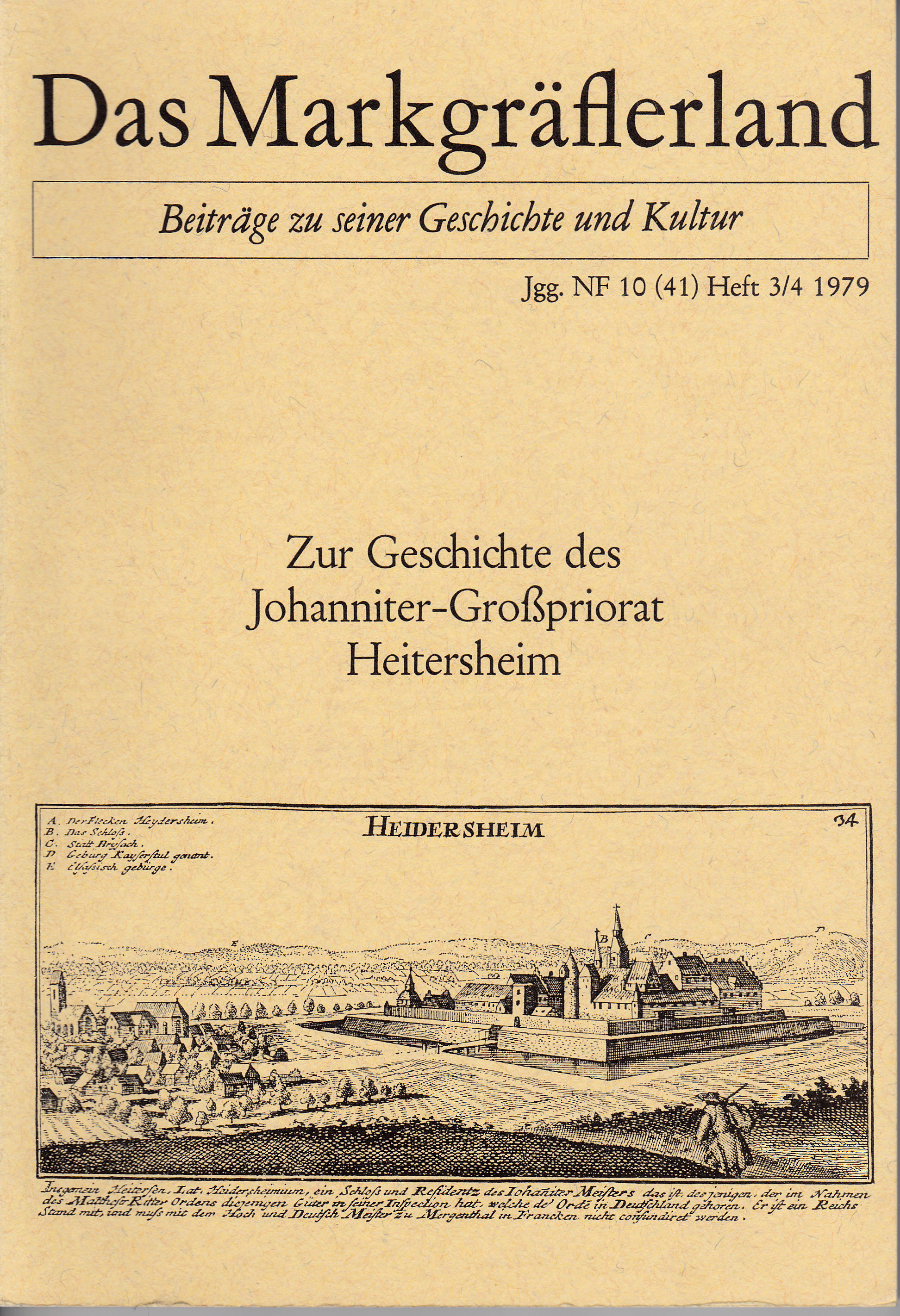 Das Markgräflerland Heft 3/4 1979; Titelbild - Schloss Heitersheim